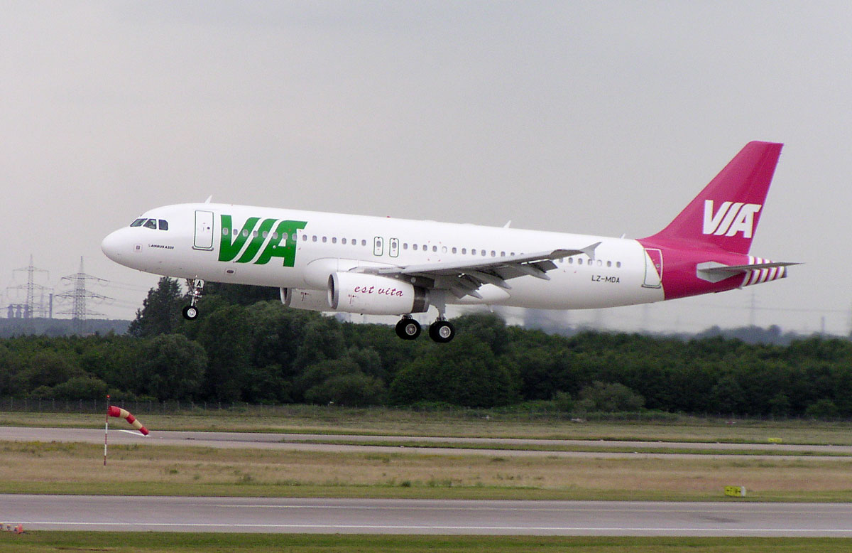 Air Via A320-200 LZ-MDA in Düsseldorf (DUS/EDDL)